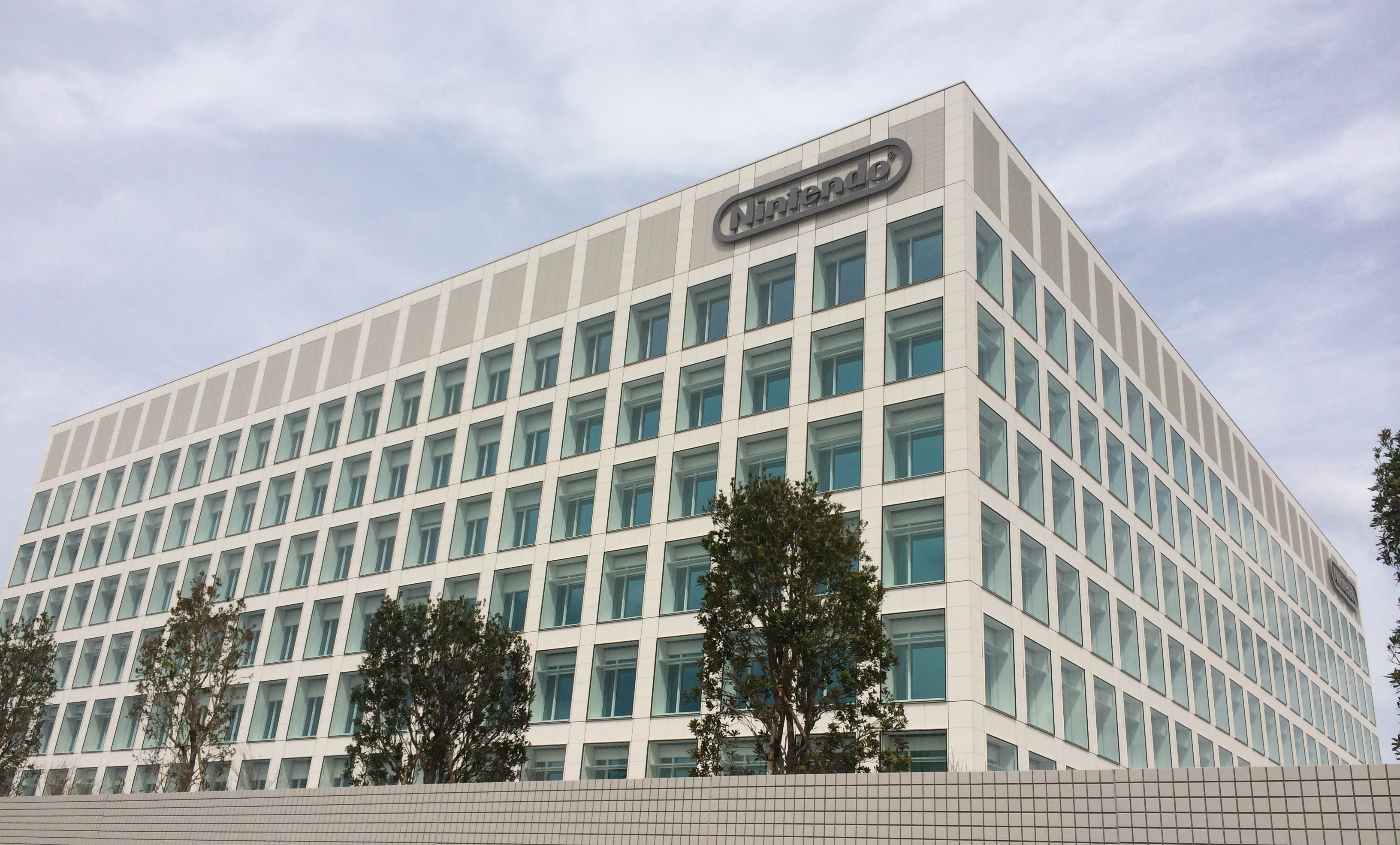 Une photographie prise par Xanday : Photo du complexe de développement Nintendo de Kyoto, il a été inauguré en 2014.